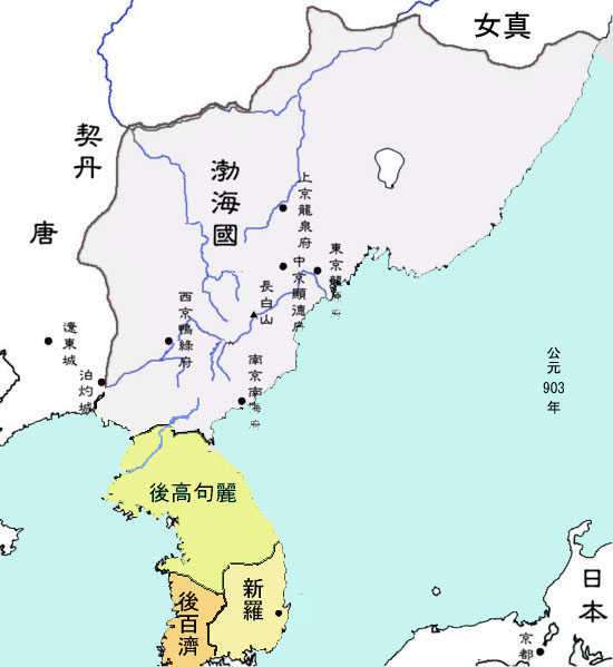 后三国